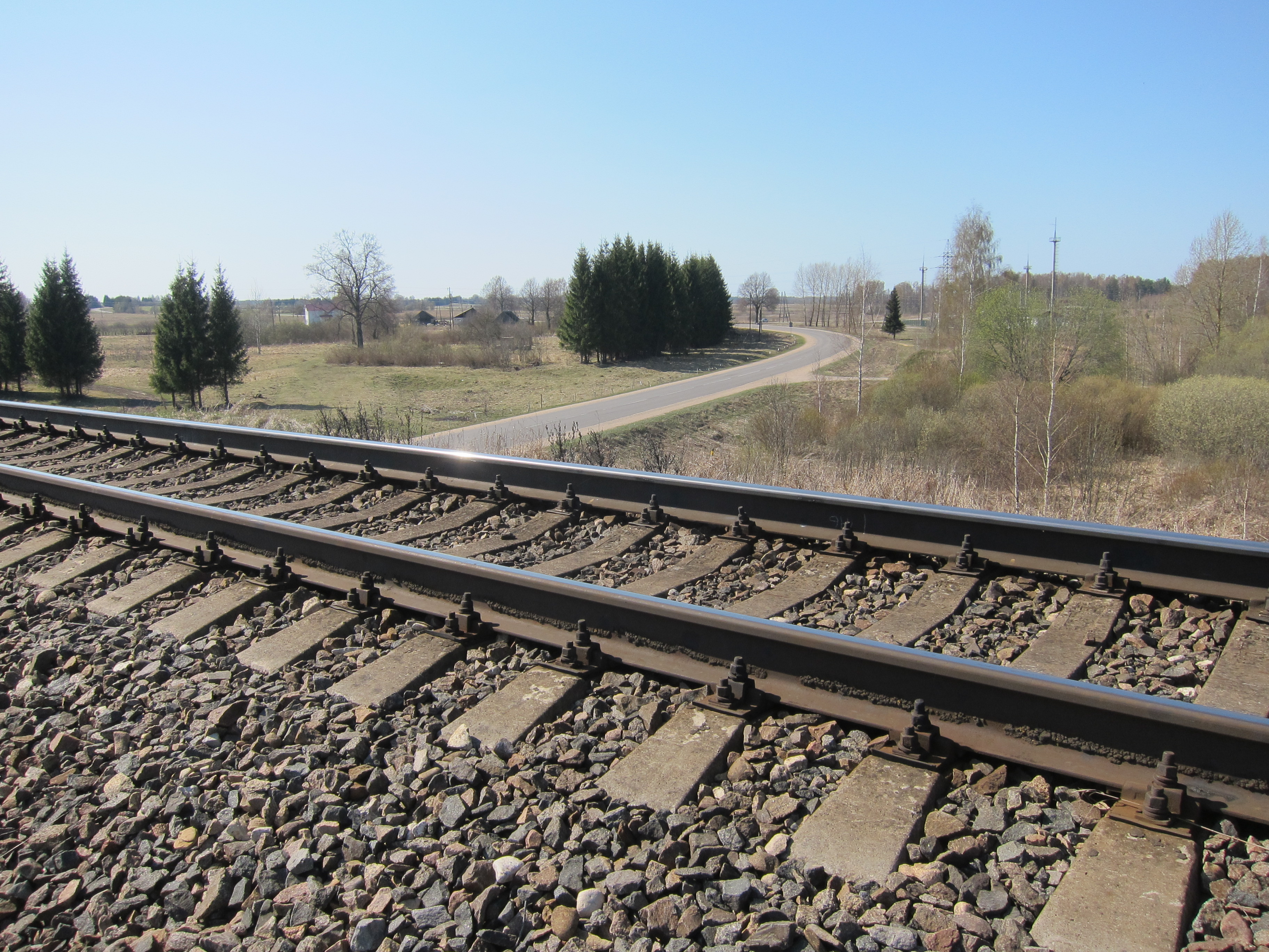 Dzelzceļa sliedes pie Višķu stacijas, tālumā autoceļš Višķi—Nīcgale